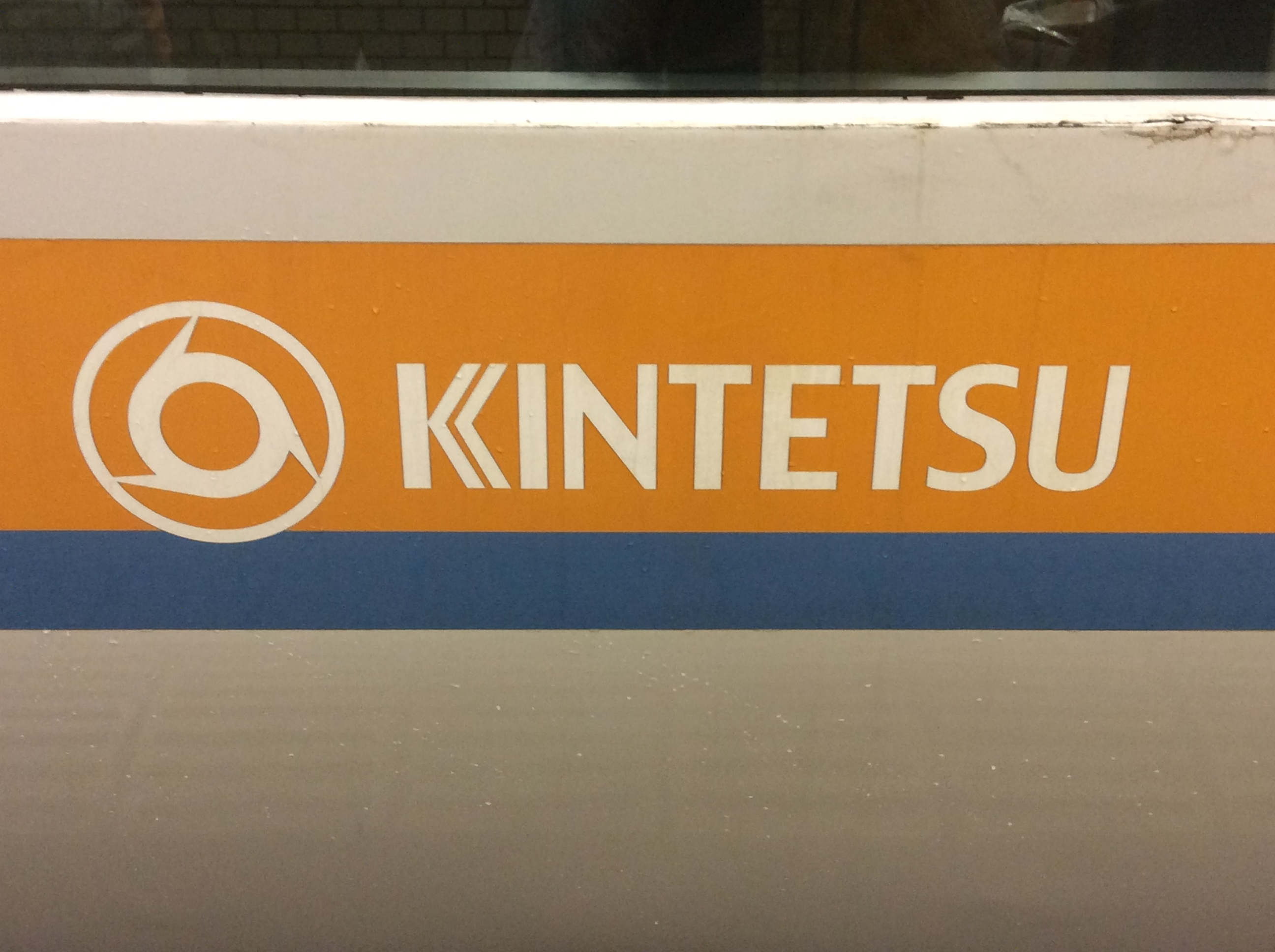 近鉄7000系の側面にあるKINTETSUロゴと社章。谷町四丁目駅にて。